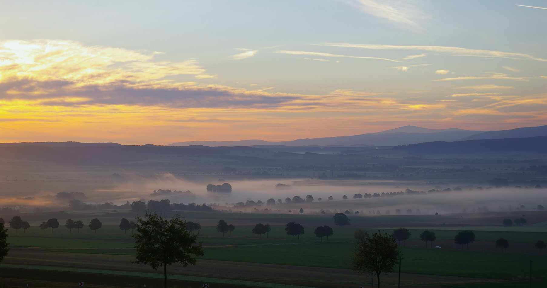 Morgennebel im Ambergau, Landkreis Hildesheim. Rechts der Bildmitte am Horizont der Brocken im Harz.